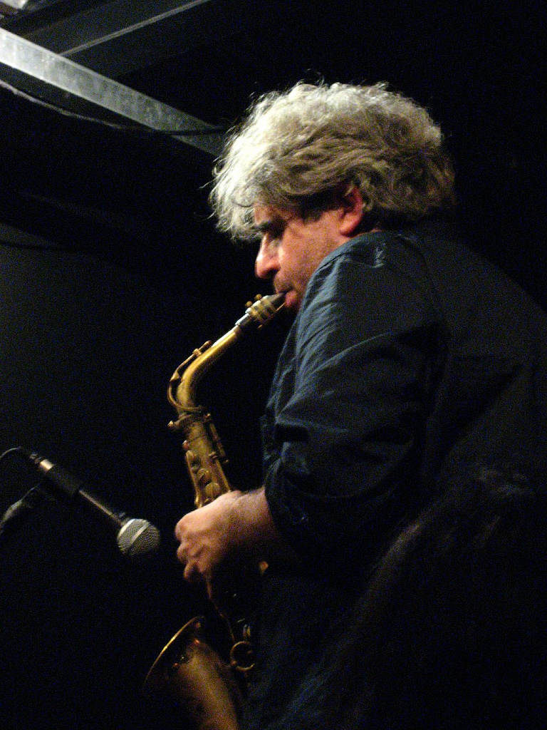 Tim Berne